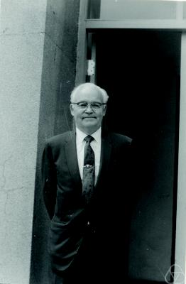 Foto di Magnus Hestenes